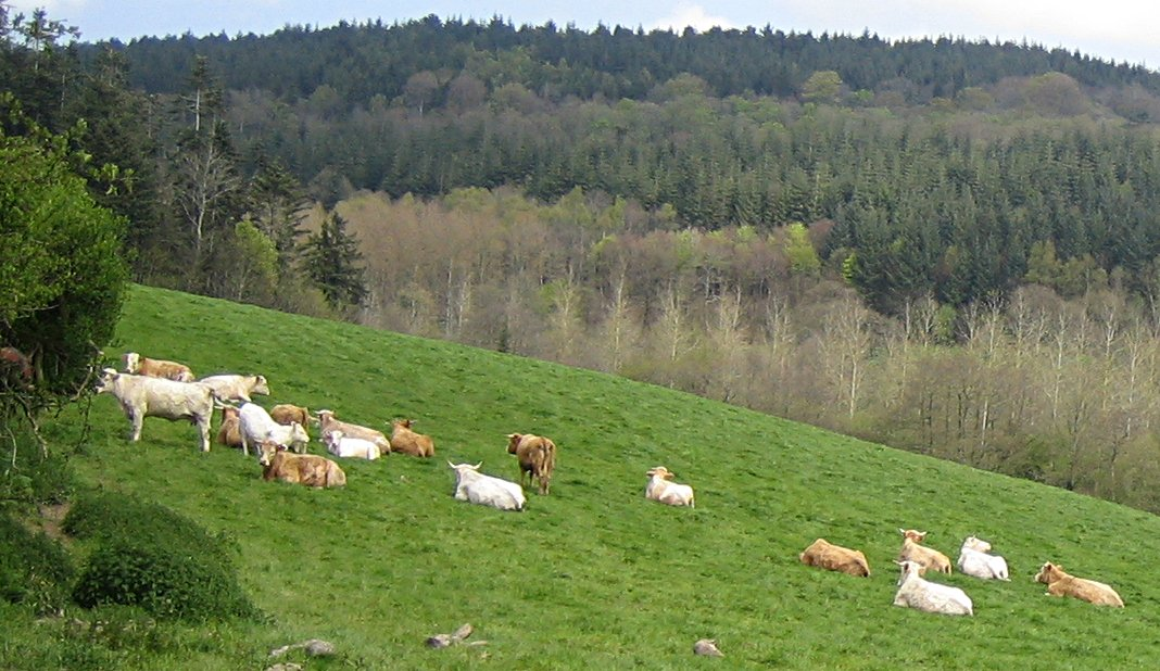 Val de Saire, near Le Vast (Cotentin, France, near Cherbourg)